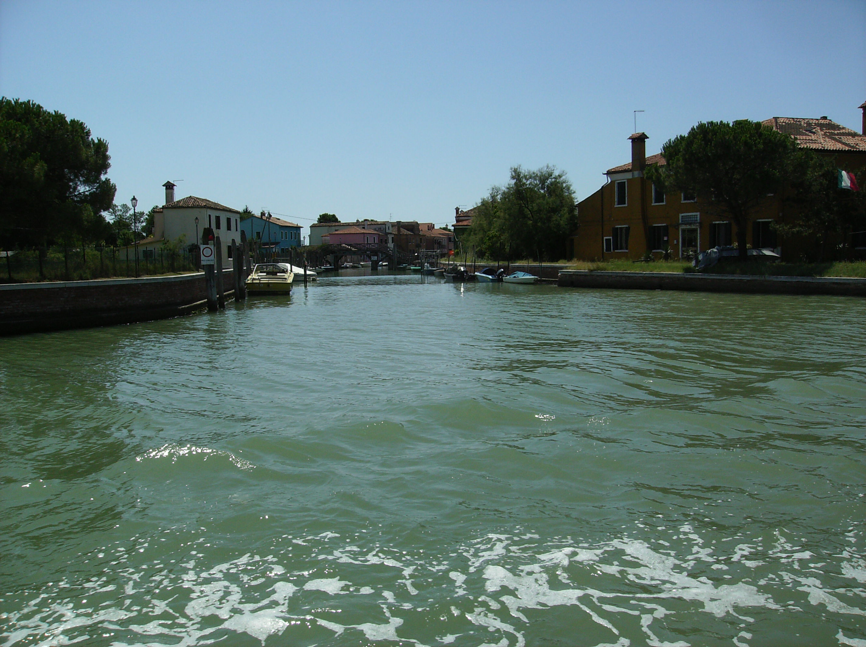 Mazzorbo-Burano Canal entre les deux iles